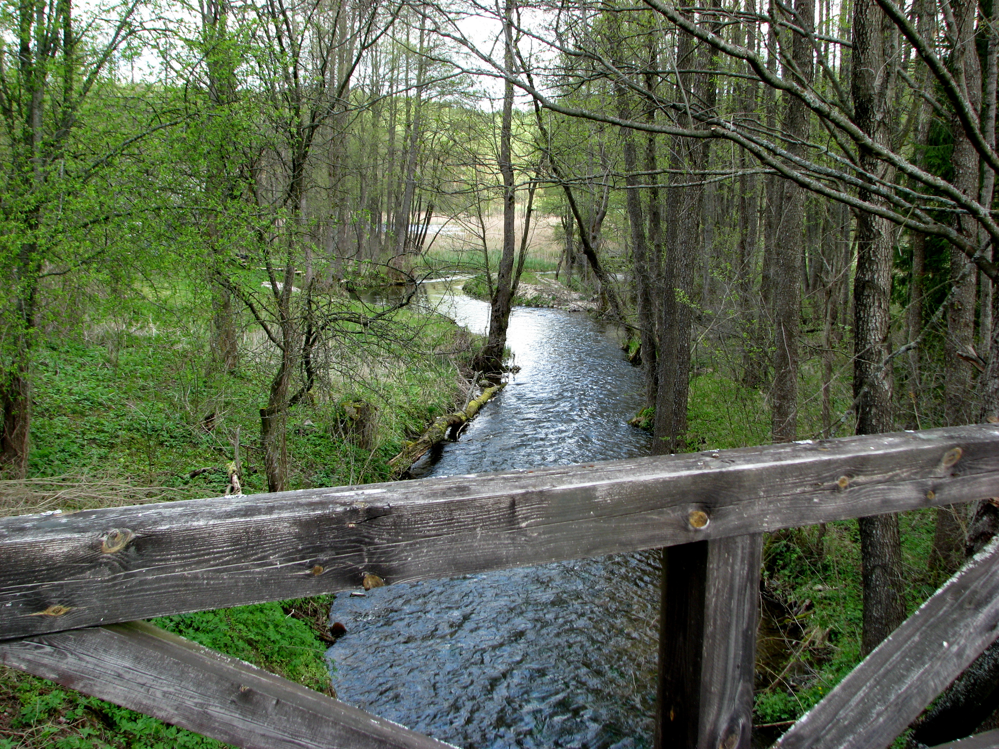 Verknės upė prie Derionių kaimo